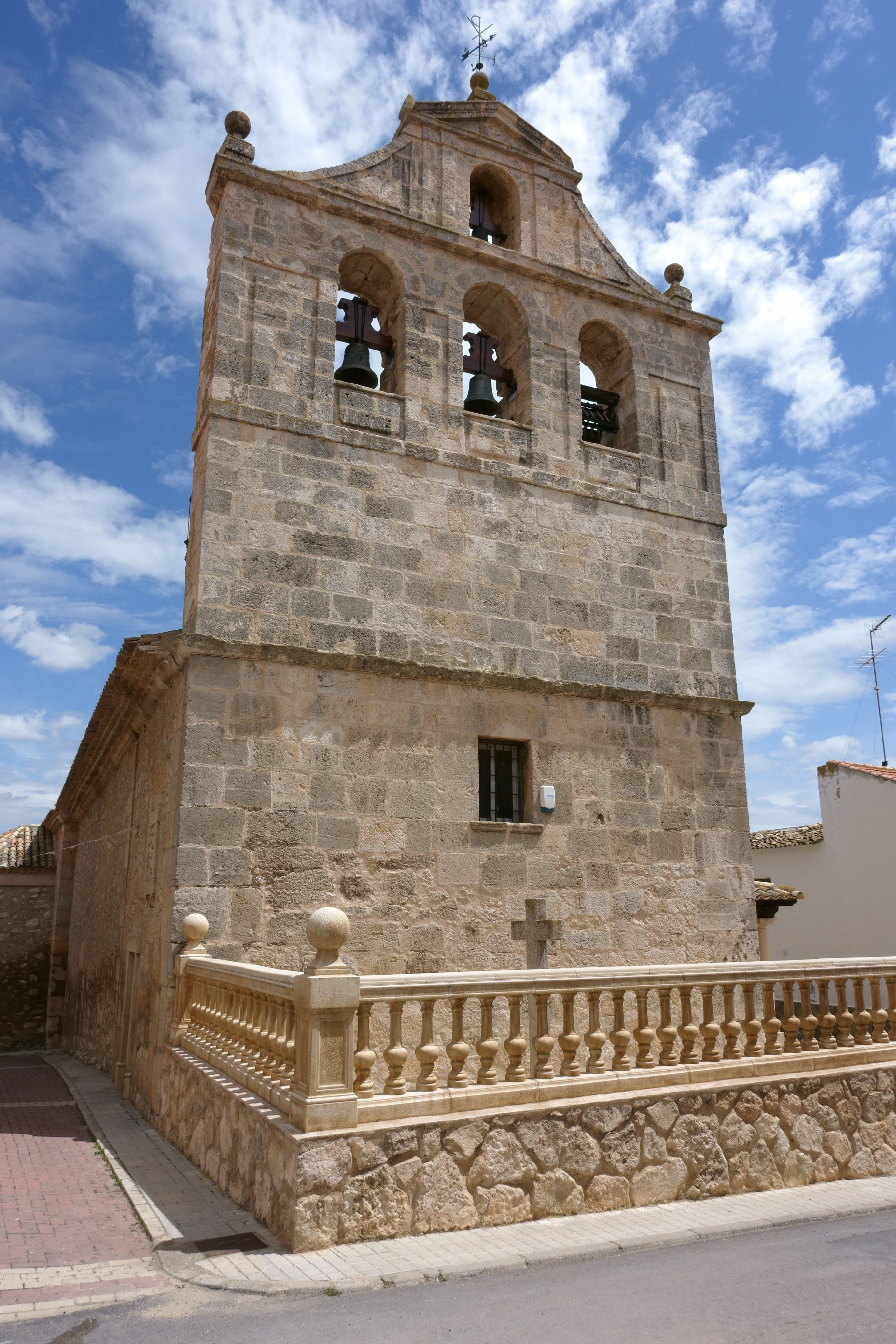 Iglesia de Nuestra Señora de los Remedios, en Villa de la Encina (Cuenca, España).